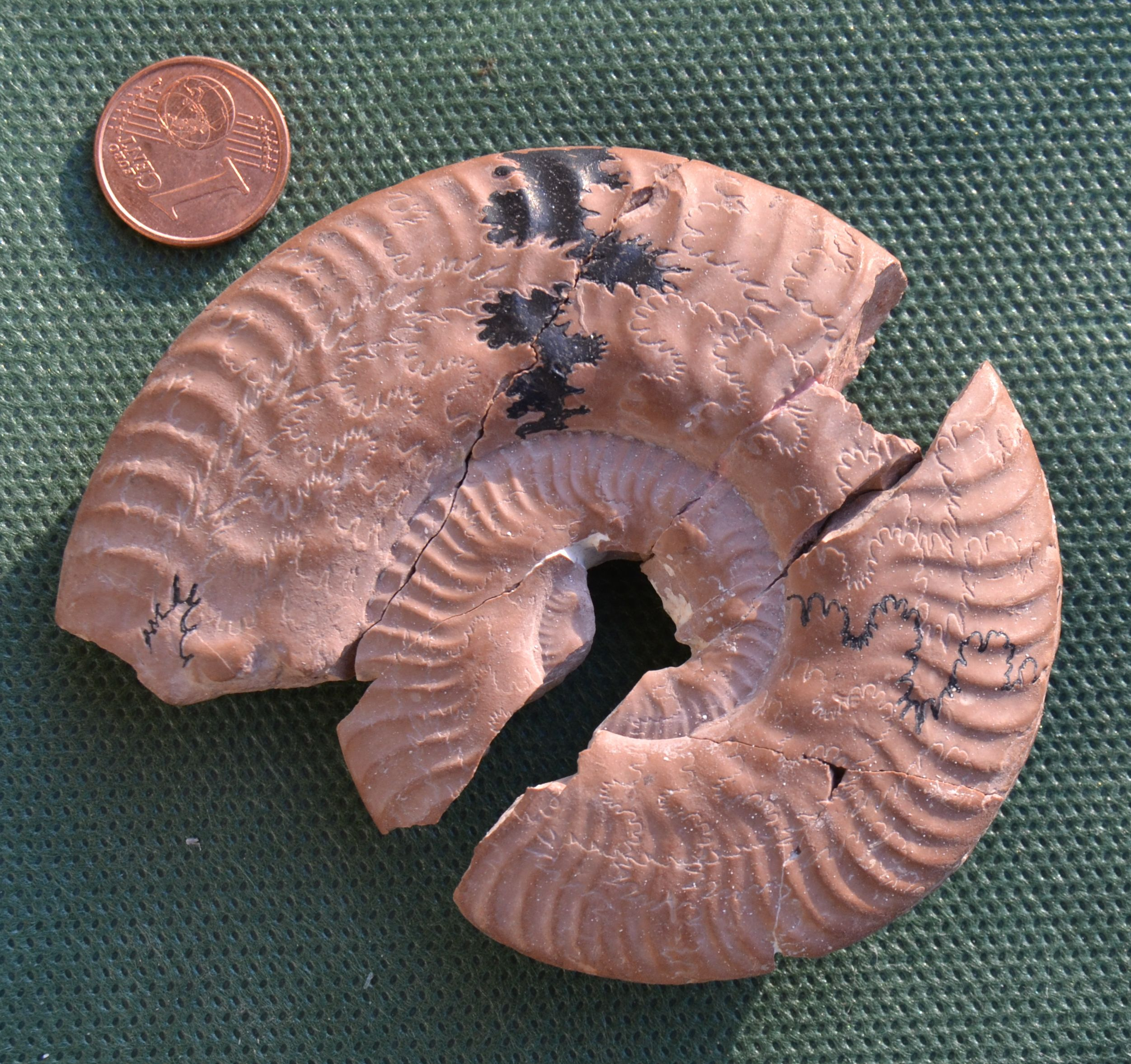 modello assai ben conservato mancante di alcune parti, estratto dagli strati del "Rosso Ammonitico" di Cima Panco (M. Martani, Umbria, Italia), durante un campionamento del 1991. La zona ad ammoniti di competenza è: zona a Hildaites undicosta. L'ammonite appartiene alla sottofamiglia Harpoceratinae.